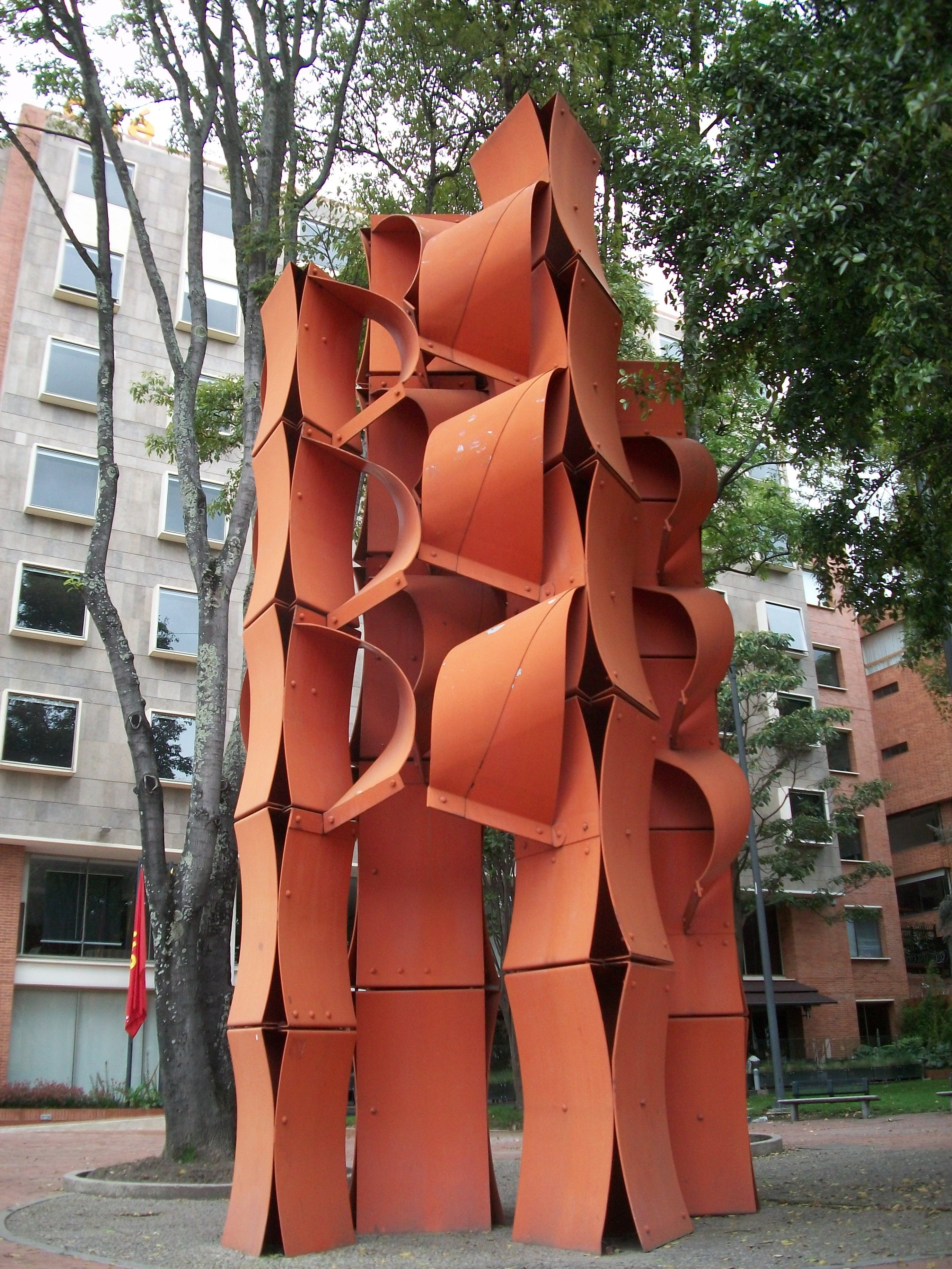 Escultura de Édgar Negret en el parque El Virrey de Bogotá, a la altura de la cra 15.